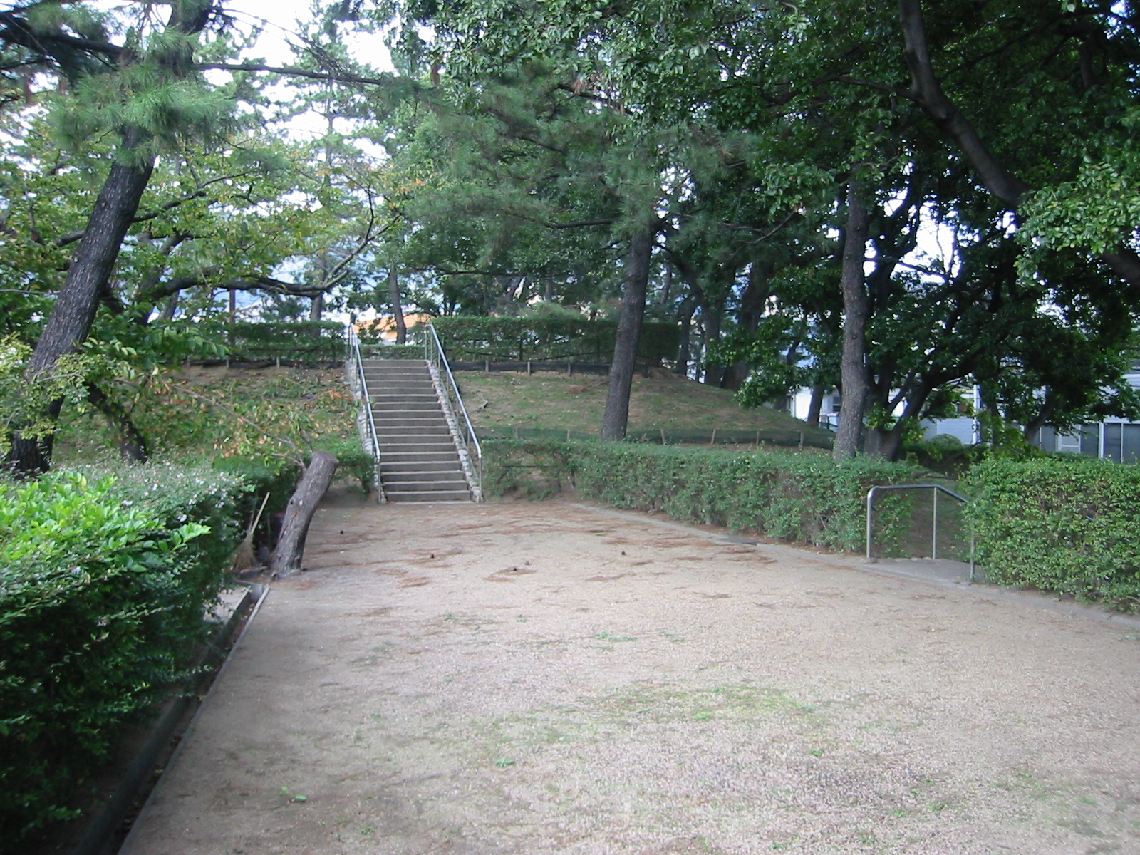 神戸 処女塚古墳（おとめづかこふん）